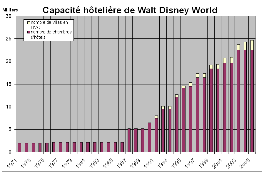 Capacité hôtelière de Walt Disney World depuis 1971 à 2005, avec dissociation des Disney Vacation Club.